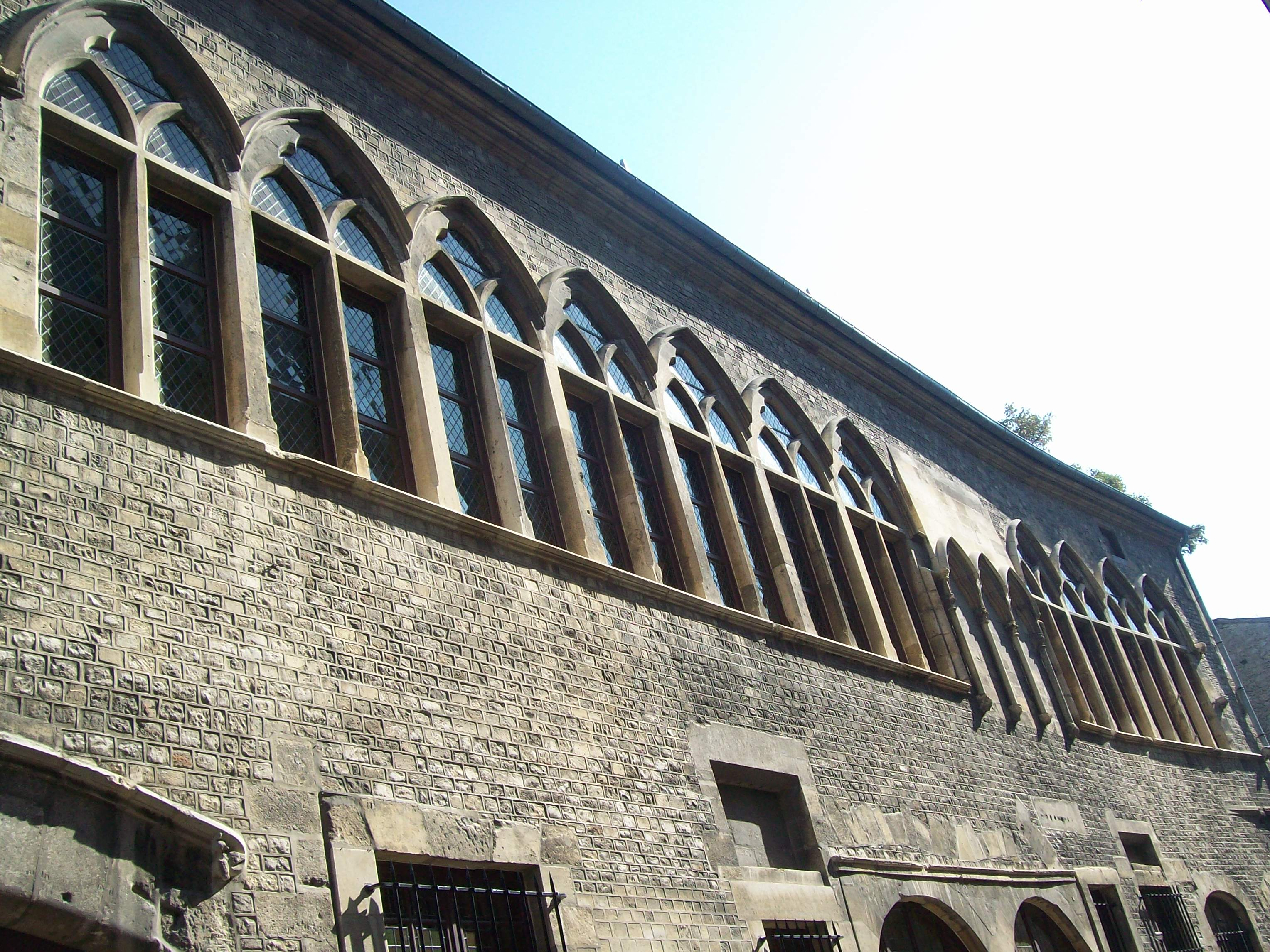 L'Hôtel des Comtes de Champagne — Reims, Champagne-Ardenne, France